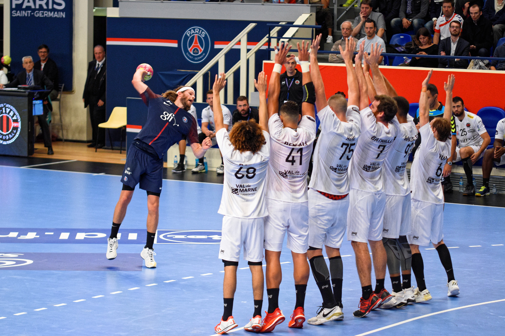 Match entre le PSG Handball et l'US Ivry. A Coubertin, le 14 septembre 2017.